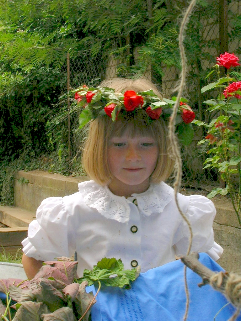 johana festo en valdorfa infanĝardeno (tiu de Groß-Umstadt en Hesio, Germanio) Fonto: propra foto